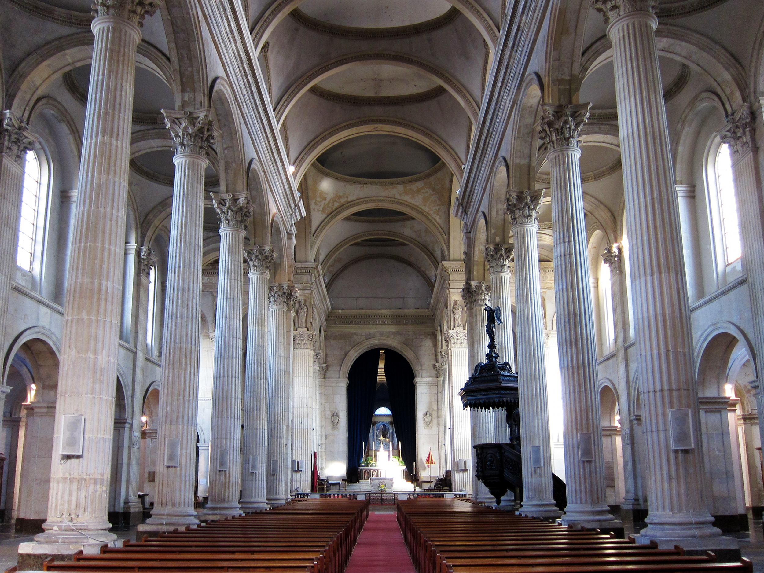 La nef de la Cathédrale Notre-Dame de Boulogne-sur-Mer.